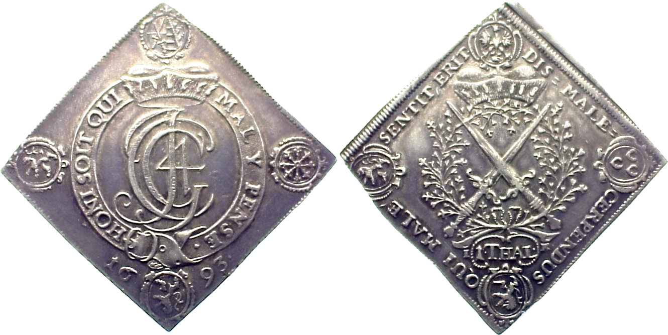 Taler-Klippe (Münze) (eckige Münze), Dresden 1693, Sachsen Albertinische Linie: Johann Georg IV. (Sachsen) (1691-1694), anläßlich des Empfang des Hosenbandordens